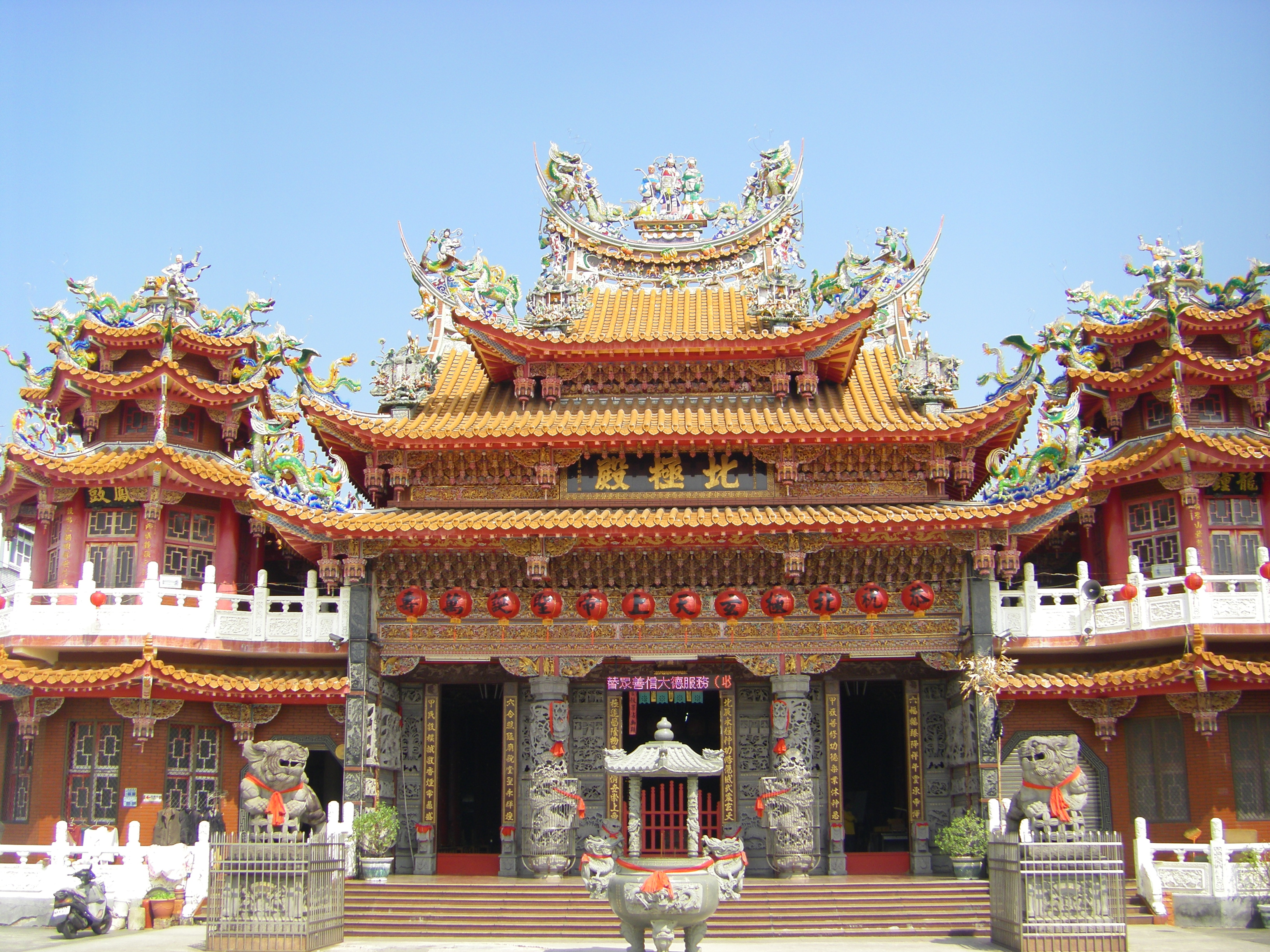 中文（台灣）: 位於台南市歸仁區的六甲北極殿